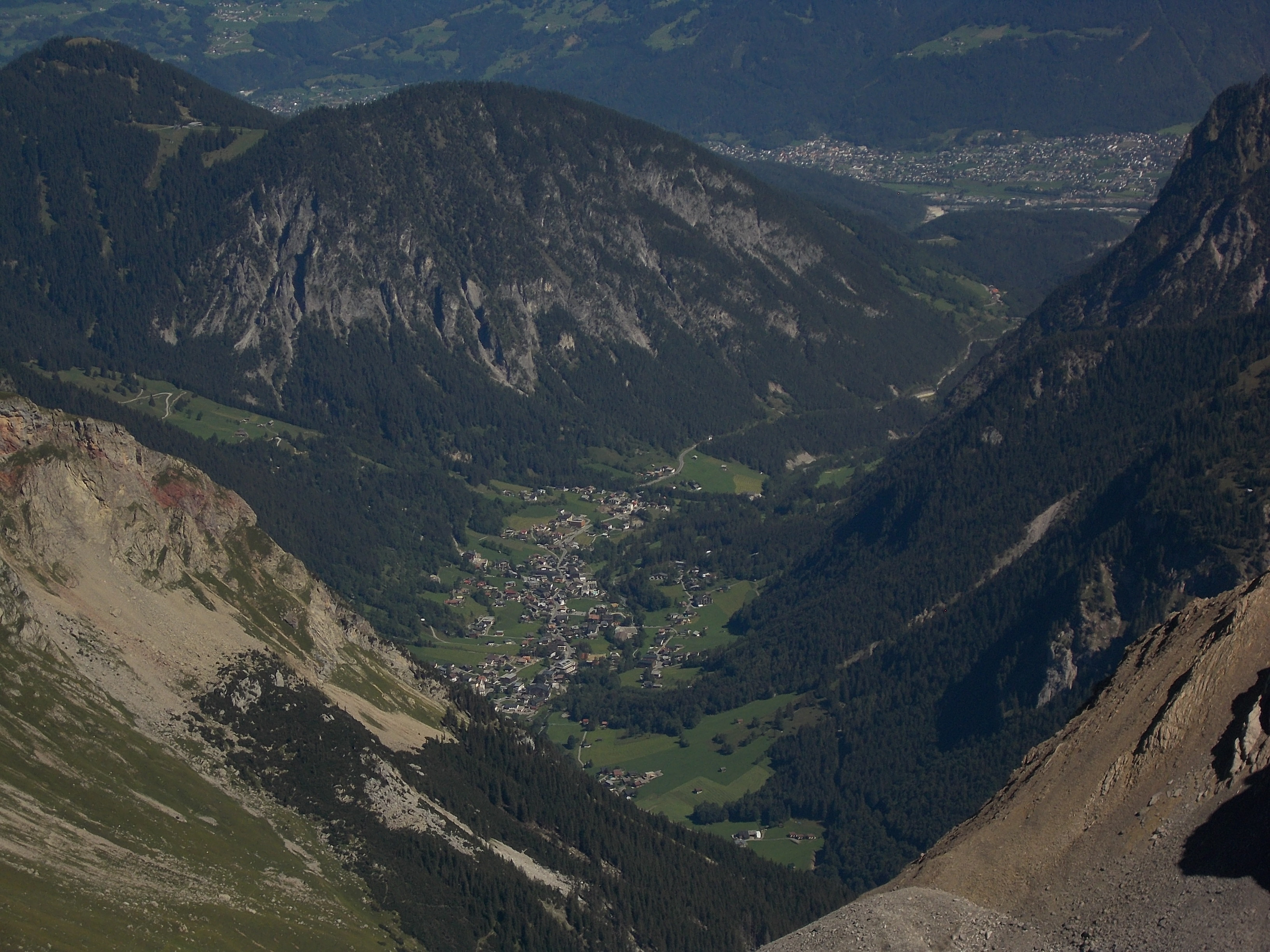 Tiefblick von der Schesaplana (2965 m) auf Brand. Im Hintergrund Nüziders und Teile von Bludenz